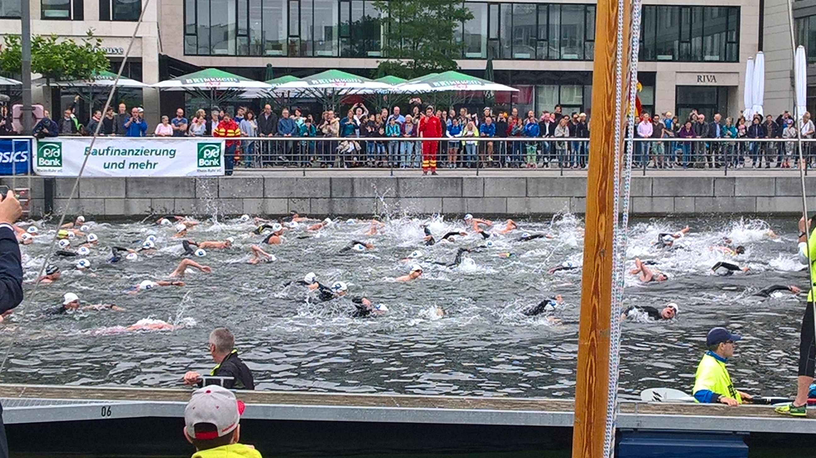 Westfalentriathlon im Phönixsee am 02.07.2017